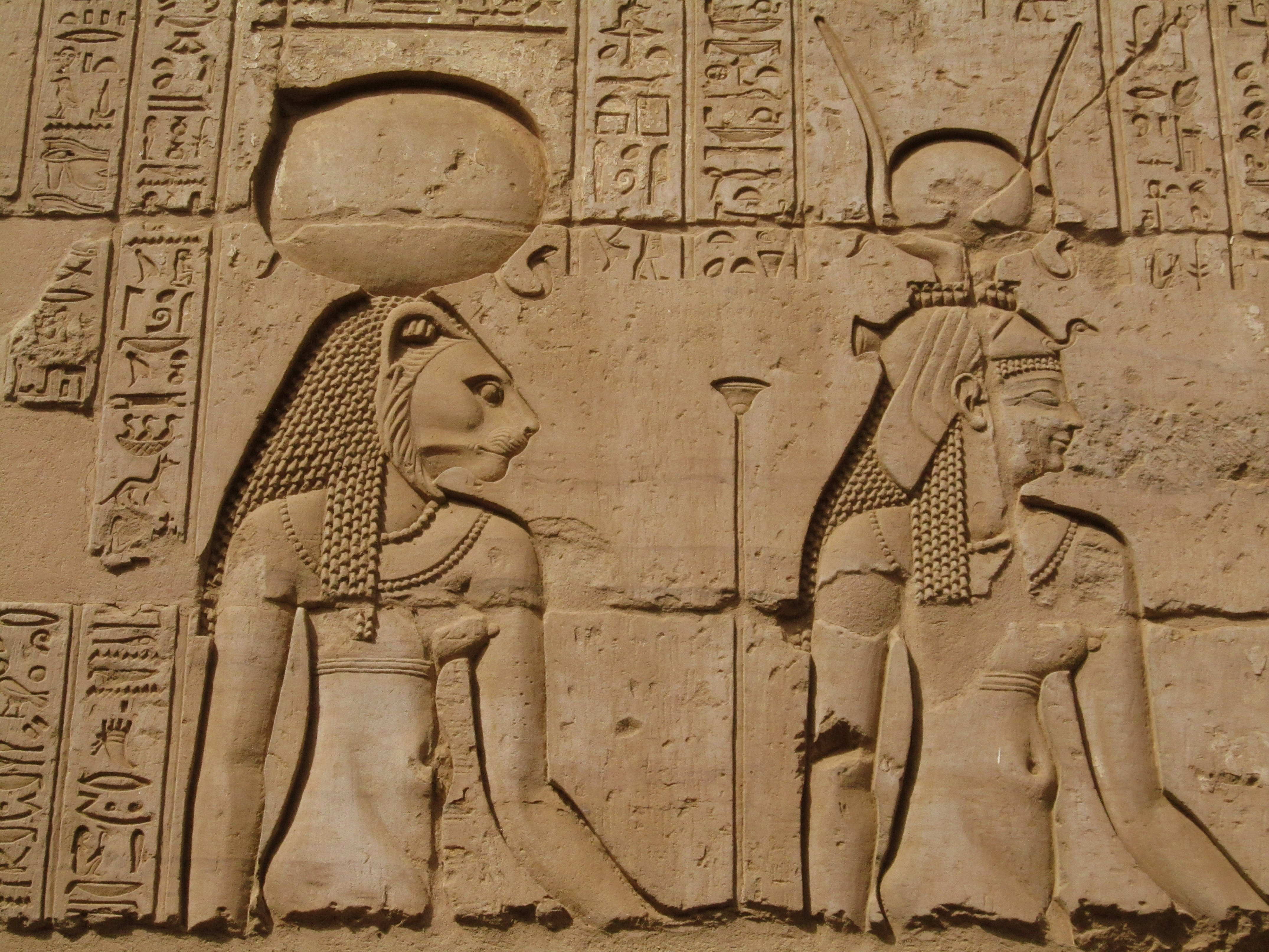 Kom Ombo Temple